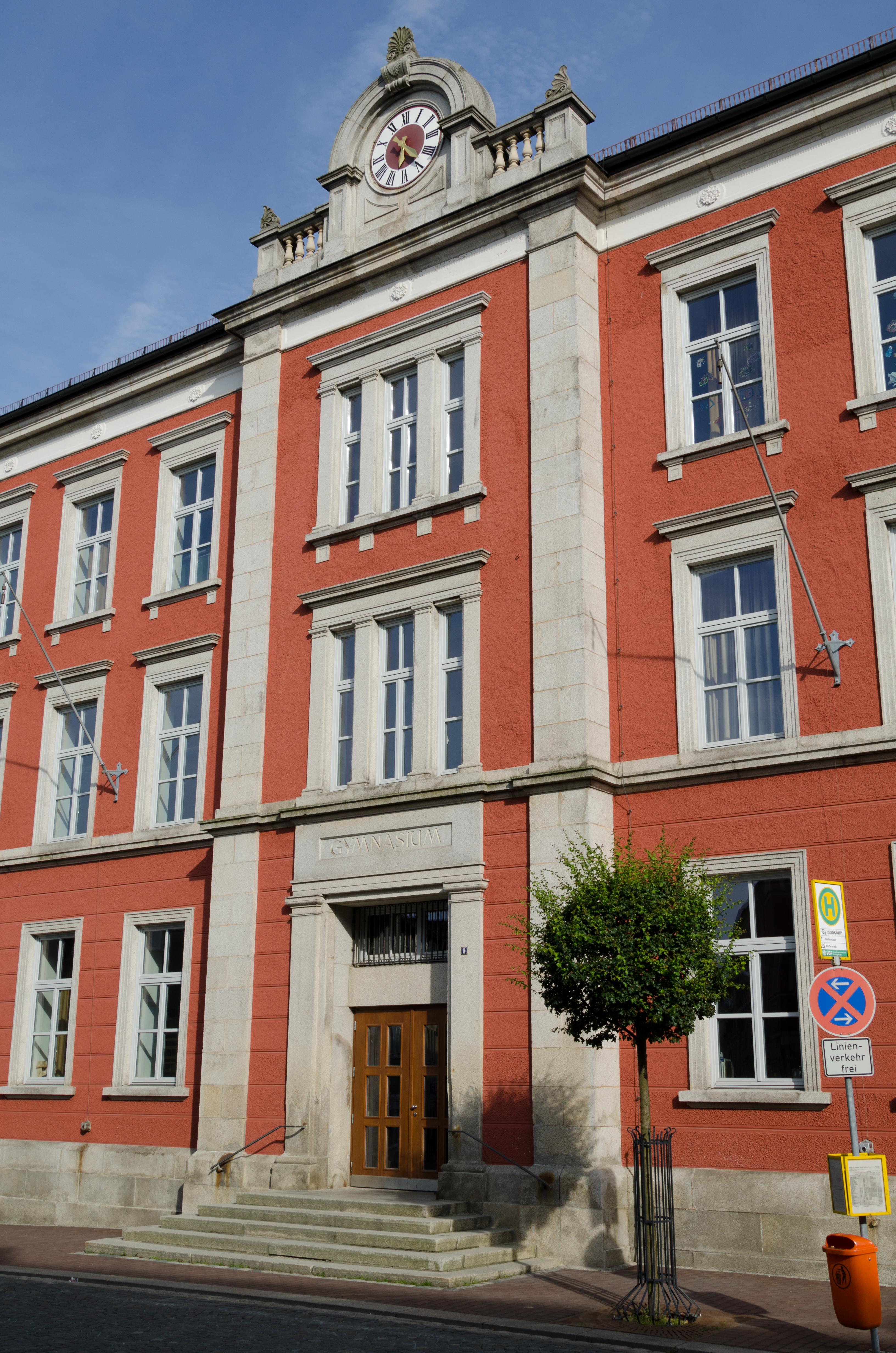 Wunsiedel, Burggraf-Friedrich-Straße 9